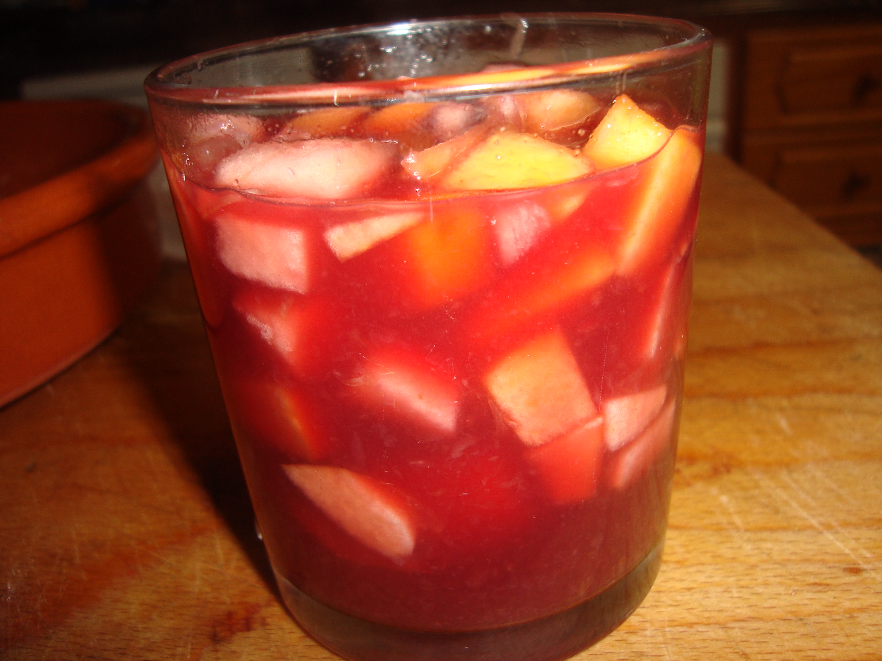 Fruta fresca y vino endulzado con azúcar, un postre agrorural antiguo predecesor de la famosa Sangria